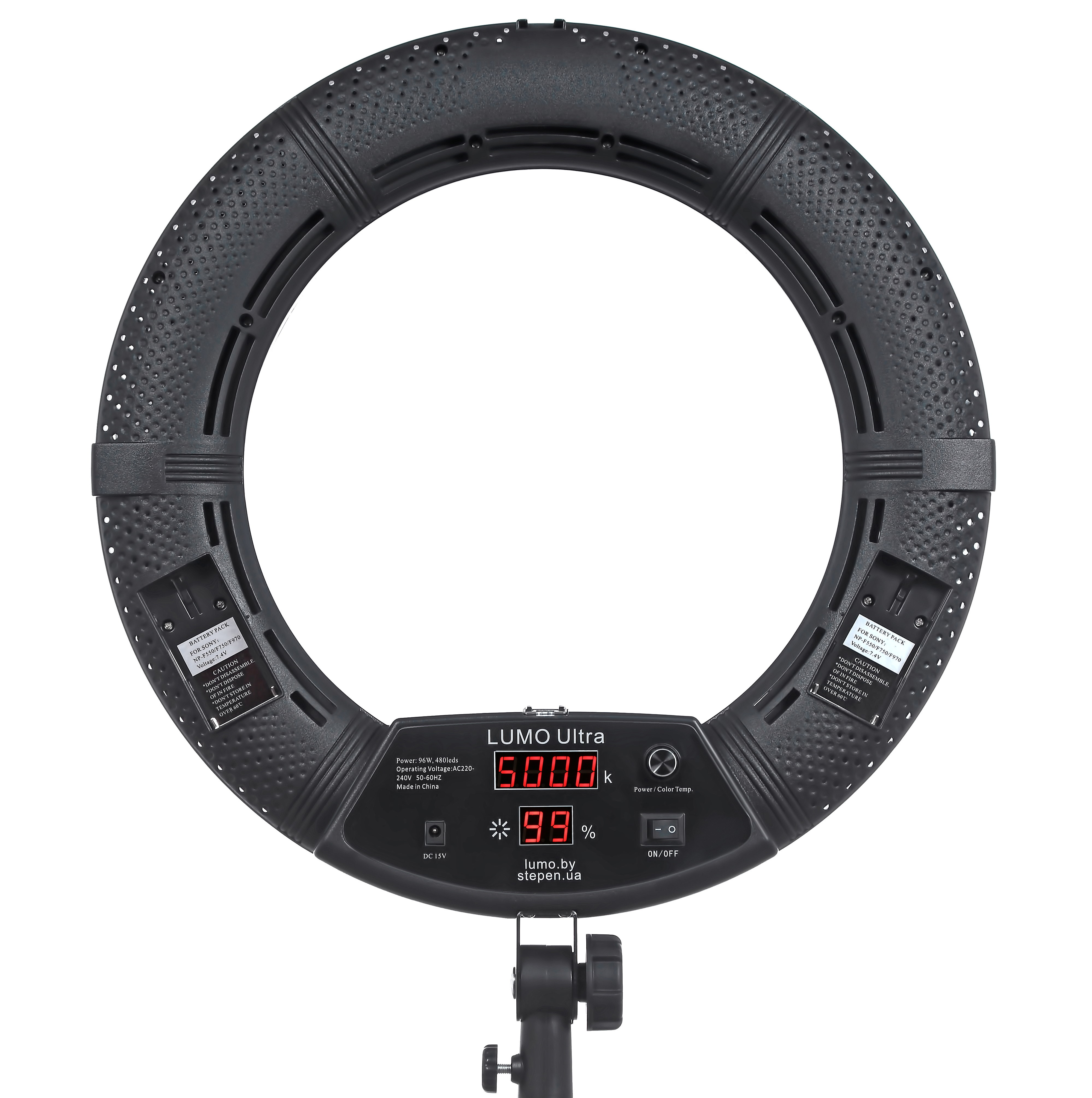 Некоторые модели кольцевых ламп работают от сети и аккумуляторов, чем часто пользуются фотографы и блогеры.